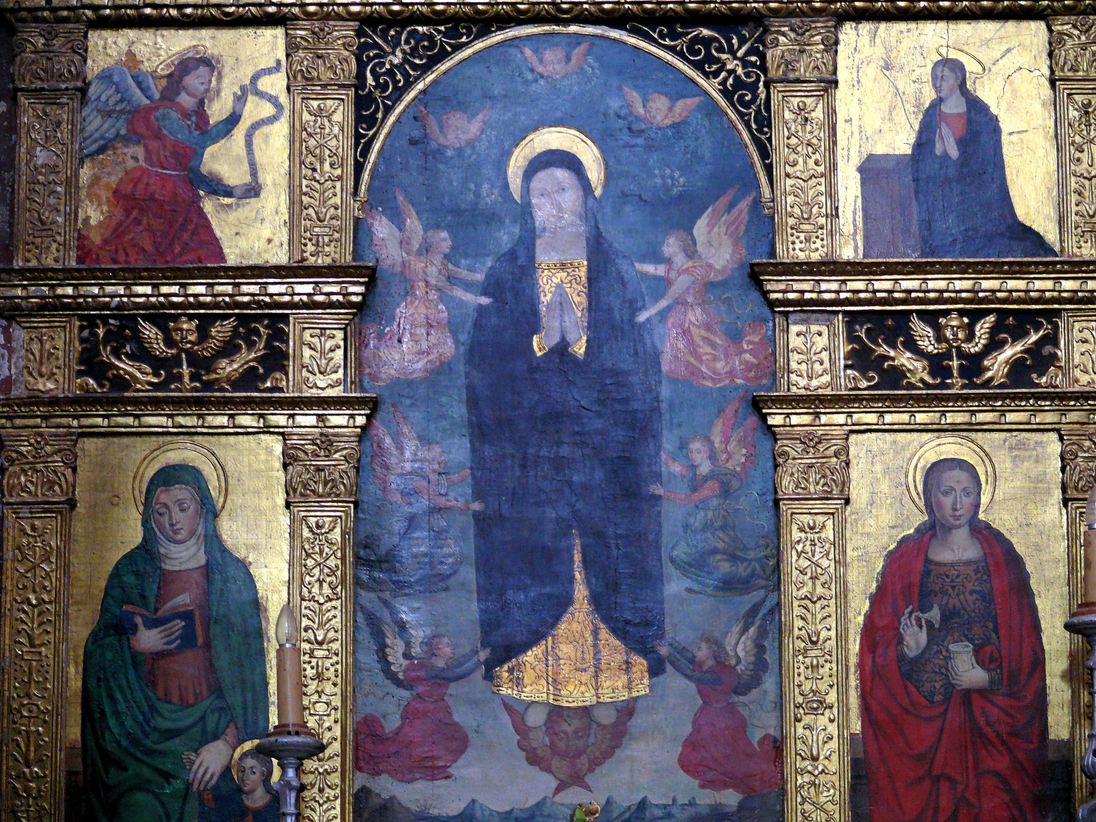 Roure - Eglise Saint-Laurent - Retable de l'Assomption (attribué à Francesco Brea)